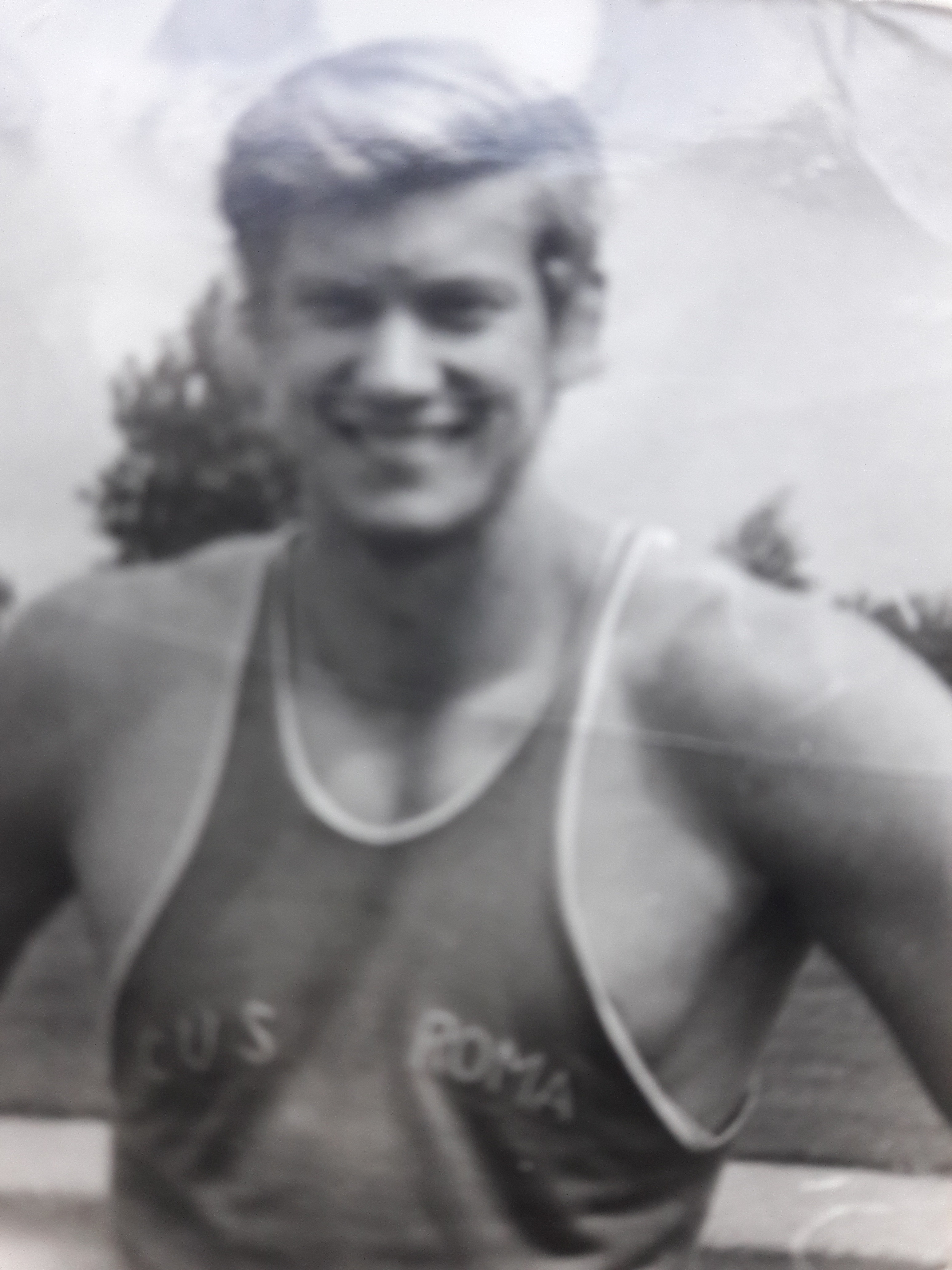 Foto des jungen Leichtathleten Günter J. Glasauer